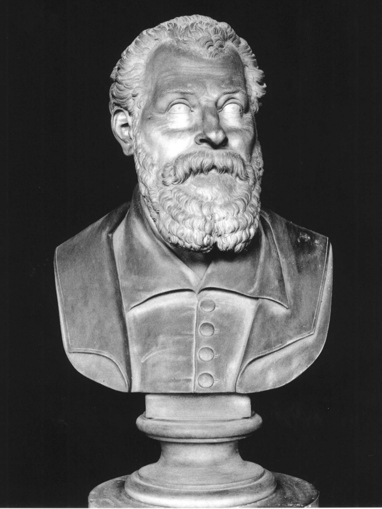 Busto di Vincenzo Scamozzi, opera di Pietro Zandomeneghi precedente al 1847. Il busto fa parte del Panteon Veneto, conservato presso Palazzo Loredan di Campo Santo Stefano a Venezia.